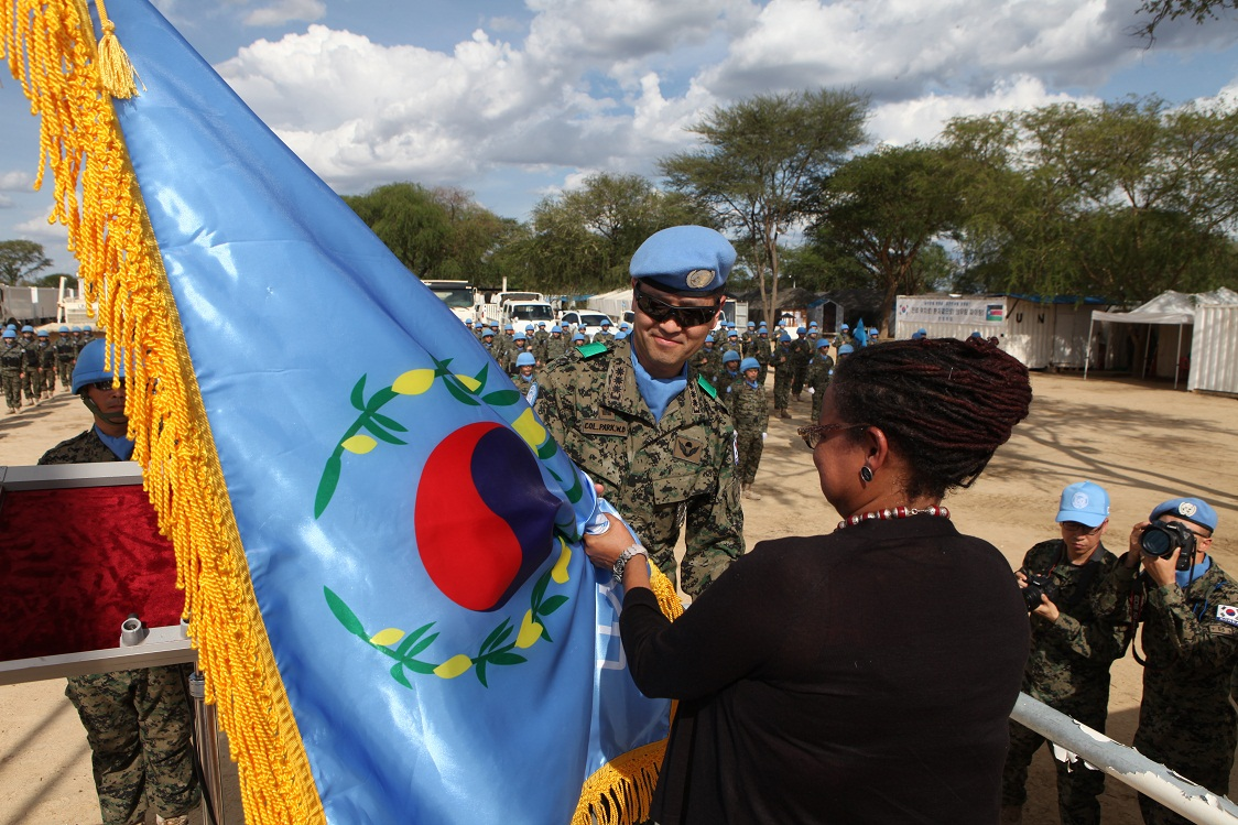 빛부대 지휘권 교대식